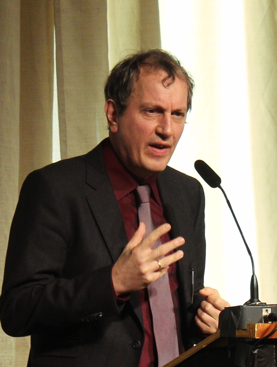 Richter Johannes Masing spricht auf der Konferenz “Einbruch der Dunkelheit" über digitale Wachsamkeit und das Recht auf Vergessen. (Bild: Tobias Schwarz/Netzpiloten, CC BY 4.0)